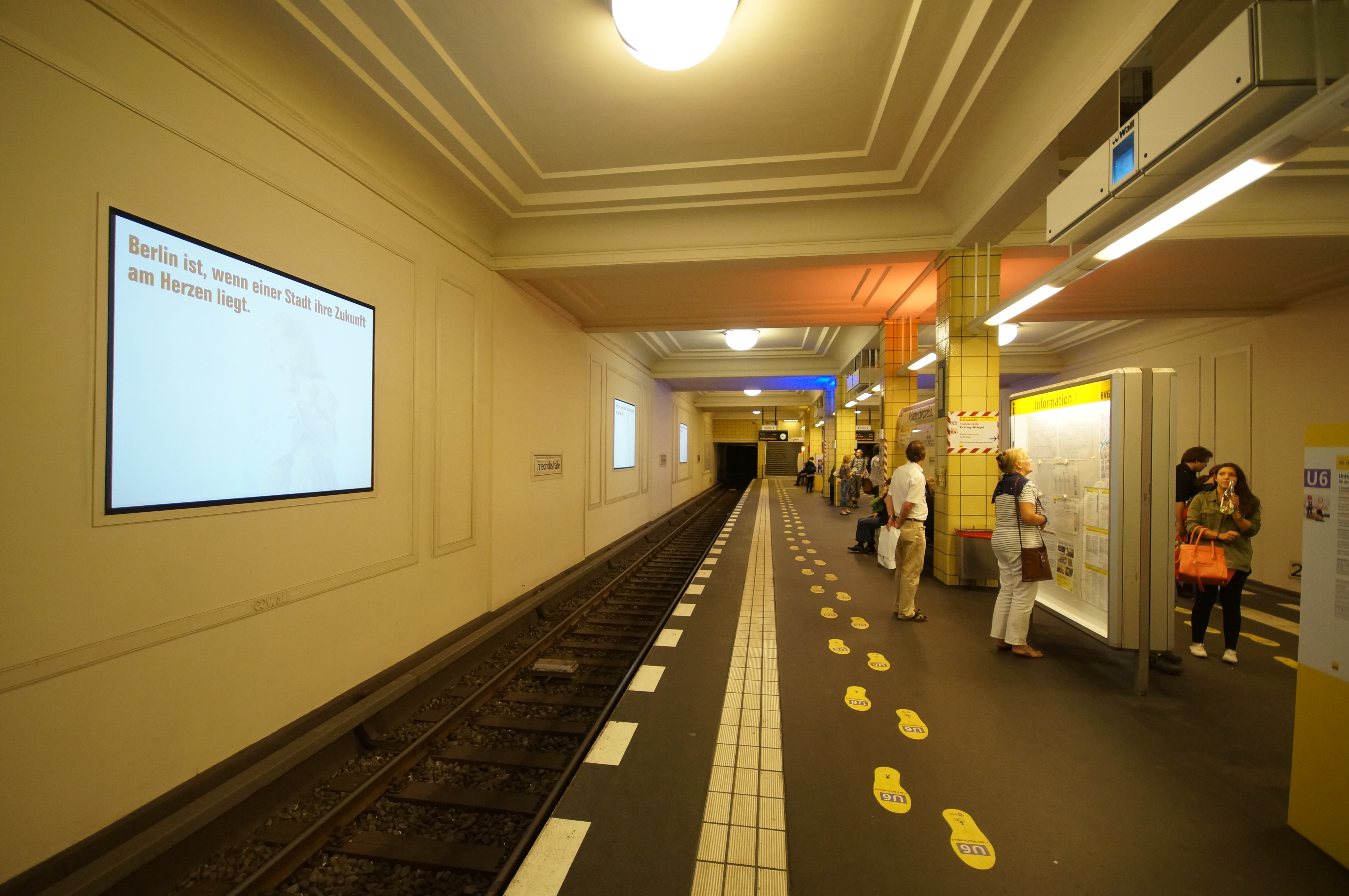 Bahnsteig zu Gleis 1 des U-Bahnhofs Berlin Friedrichstraße mit den Multimedia-Werbeprojektoren und -Werbeflächen